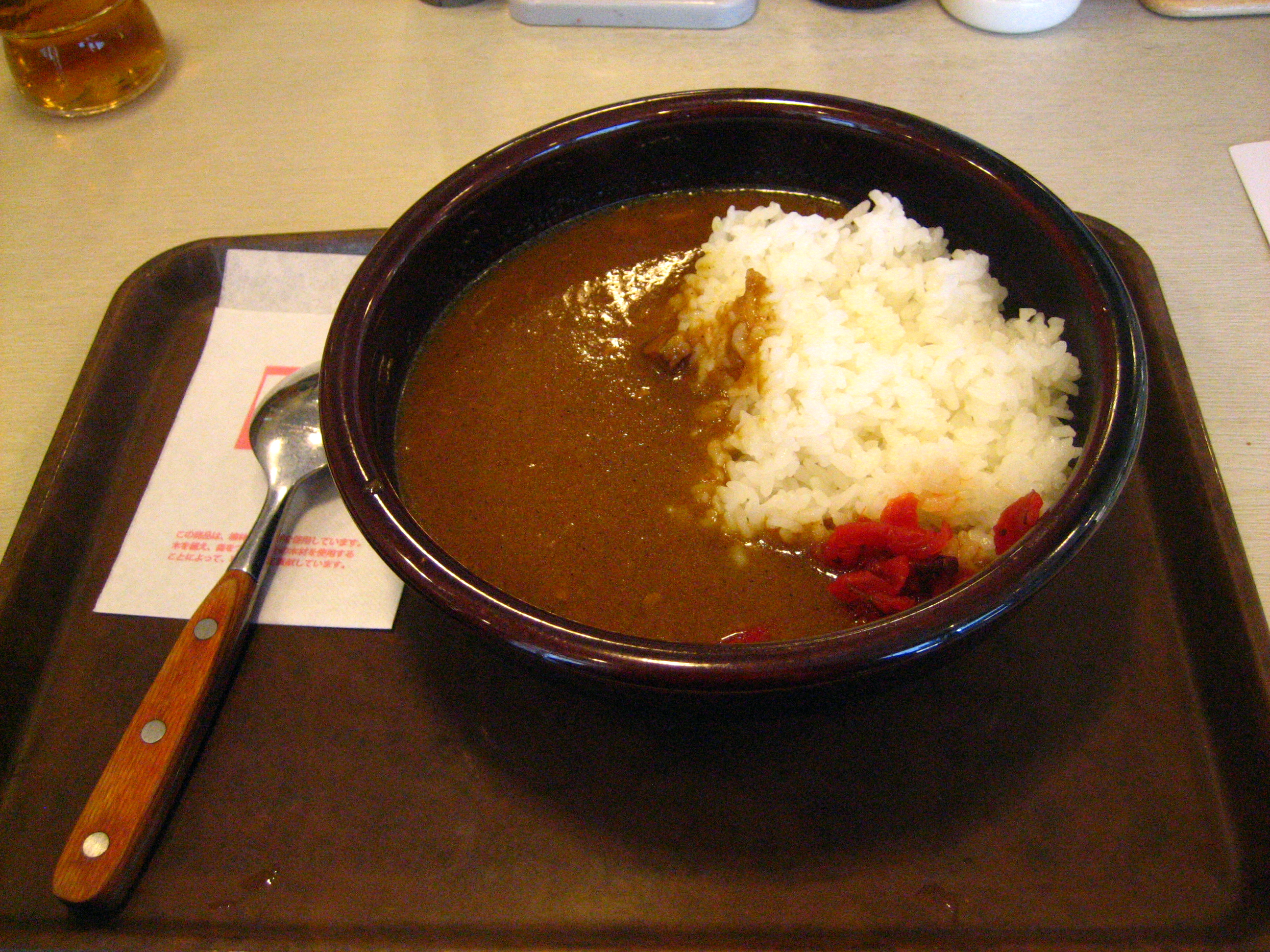 すき家のスパイシーカレー。並盛り。税込み価格330円。